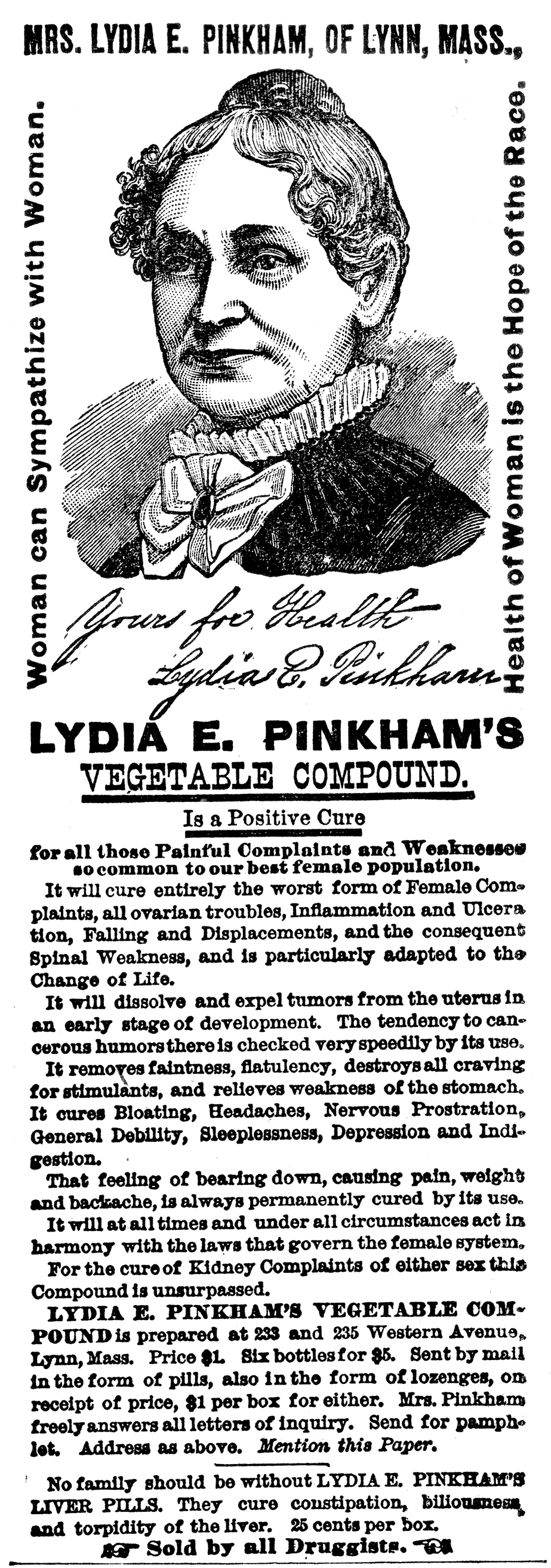 Advertisement for Lydia E. Pinkham's Vegetable Compound 1882